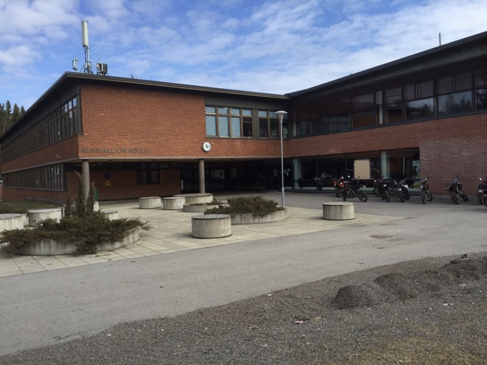 Riihikallion koulun pääsisäänkäynti Pellavamäentien suunasta koilliseen.